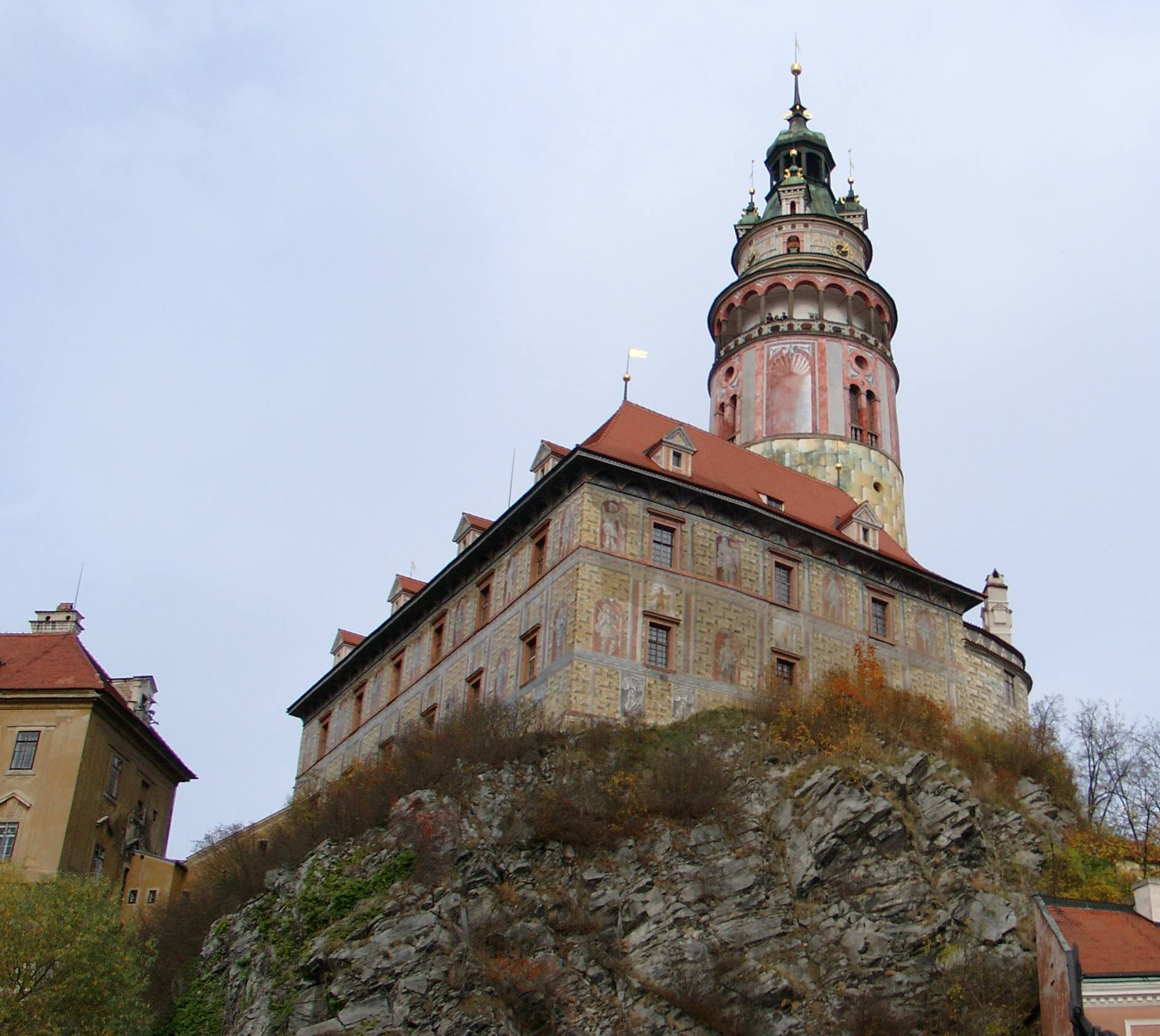 Schloss Krumau